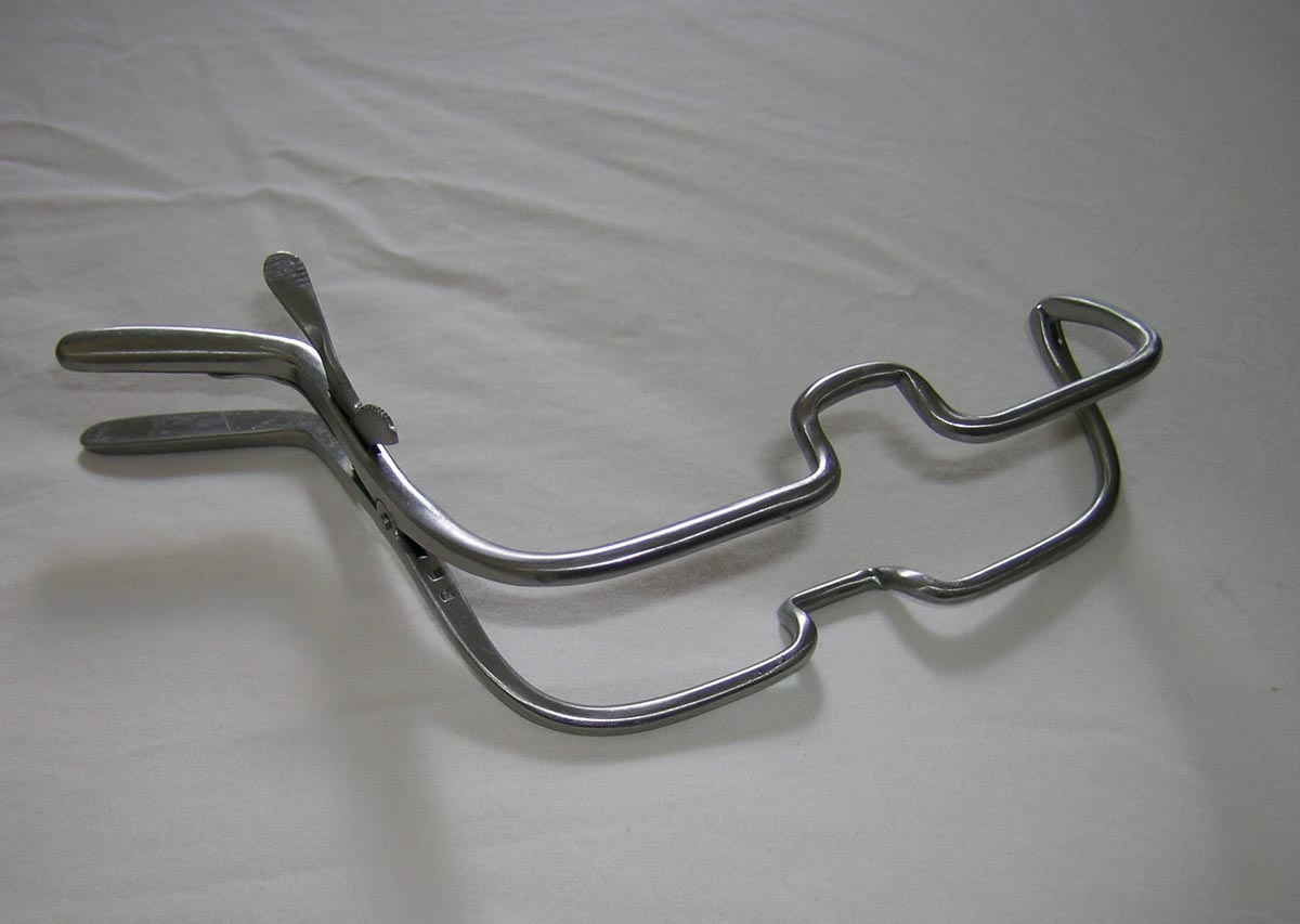 Jennings gag